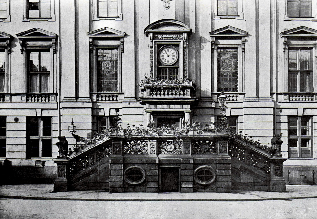 Die Rathausfassade und historisches Museum Königsberg